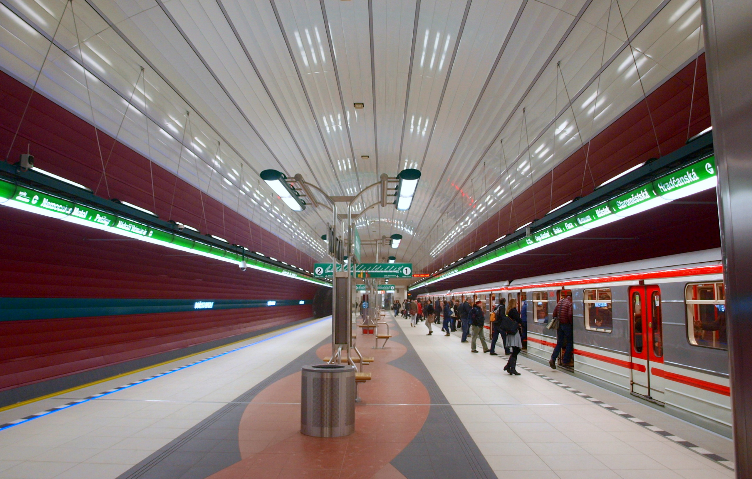 Satnice Bořislavka